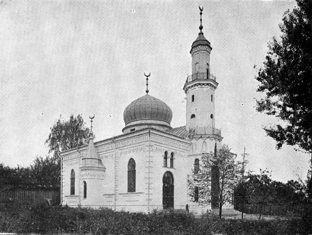 Мінская мячэцьБеларуская (тарашкевіца): Менск (Miensk), Татарская Слабада (Tatarskaja Słabada). Новы мячэт